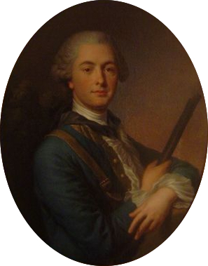 André Pierre Haudry de Soucy (1736-1817), fermier général, inspecteur des salines royales et collectionneur d'art.